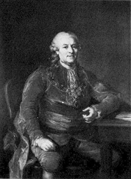 Johan (Jean) Georg Lillienberg born 3 Aug 1713 at Toftnäs, Bolmsö, Jönk, died 26 April 1798 at Herresta(d), Toresund, Söd.